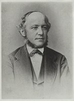 Jonas Breitenstein (1828-1877), Baselbieter Dialäktdichter un Pfaarer